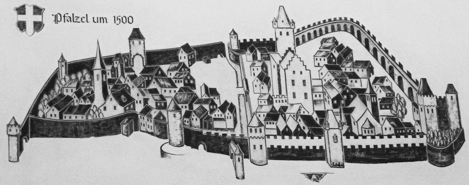 Trier Pfalzel um 1500 (Hausbemalung in Pfalzel)